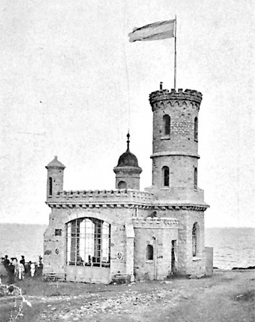 Torreón del Monje, en esos años conocido como "Torre General Pueyrredón", en la ciudad de Mar del Plata.